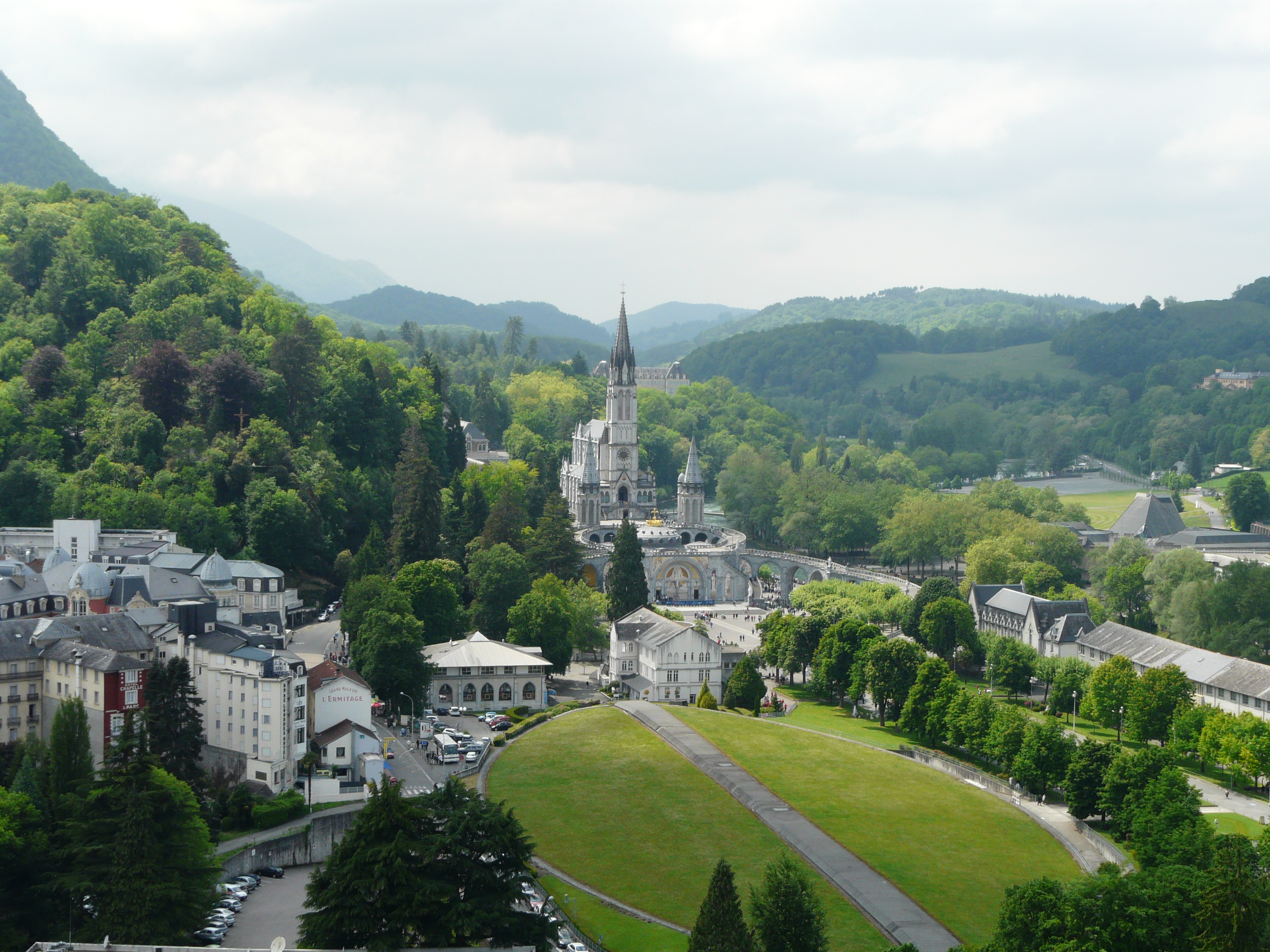 La basilique de l'Immaculée-Conception et la basilique Notre-Dame du Rosaire, Lourdes, Hautes-Pyrénées, France.